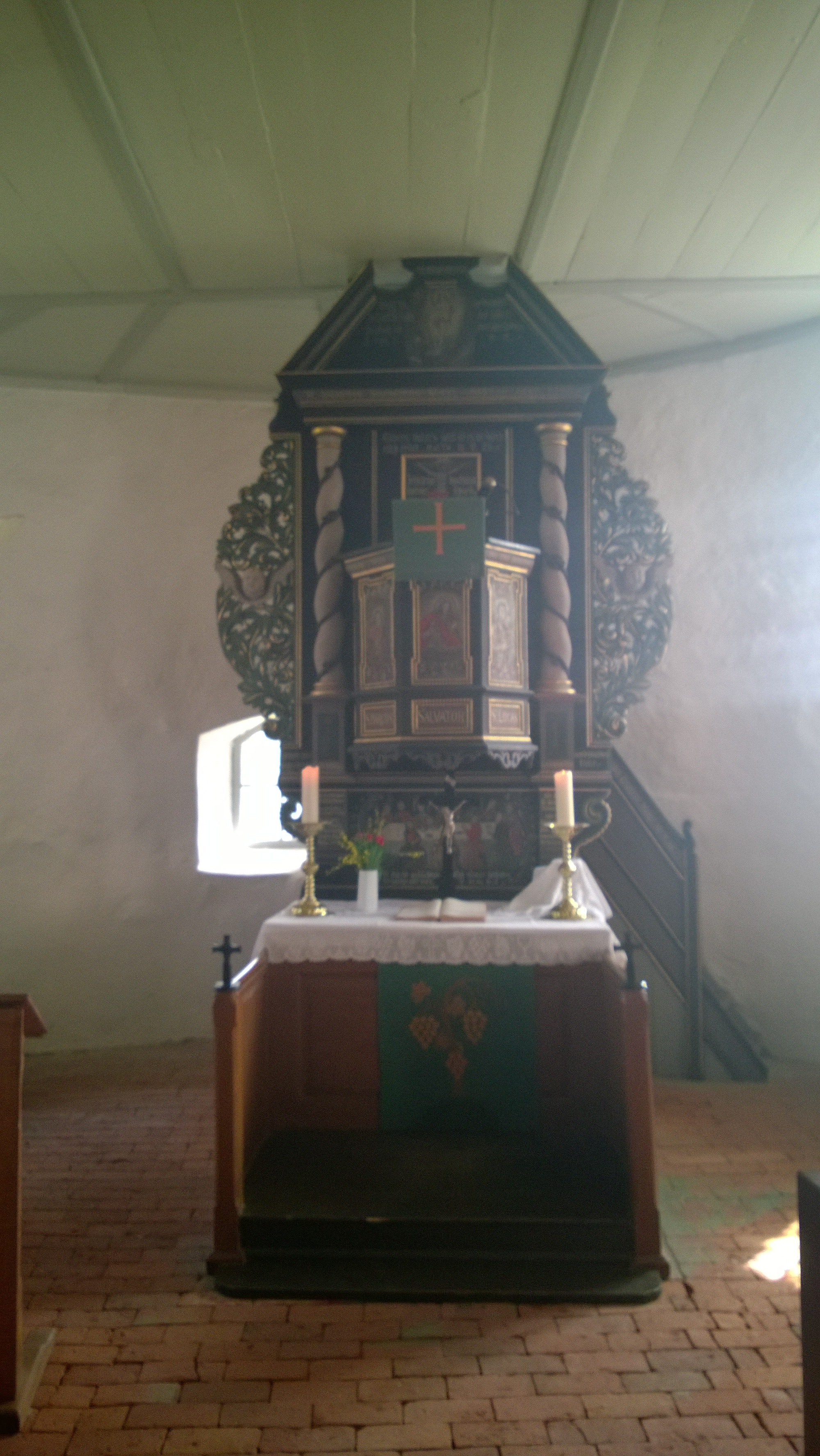 Altar von 1706 in der Kirche Meuchefitz